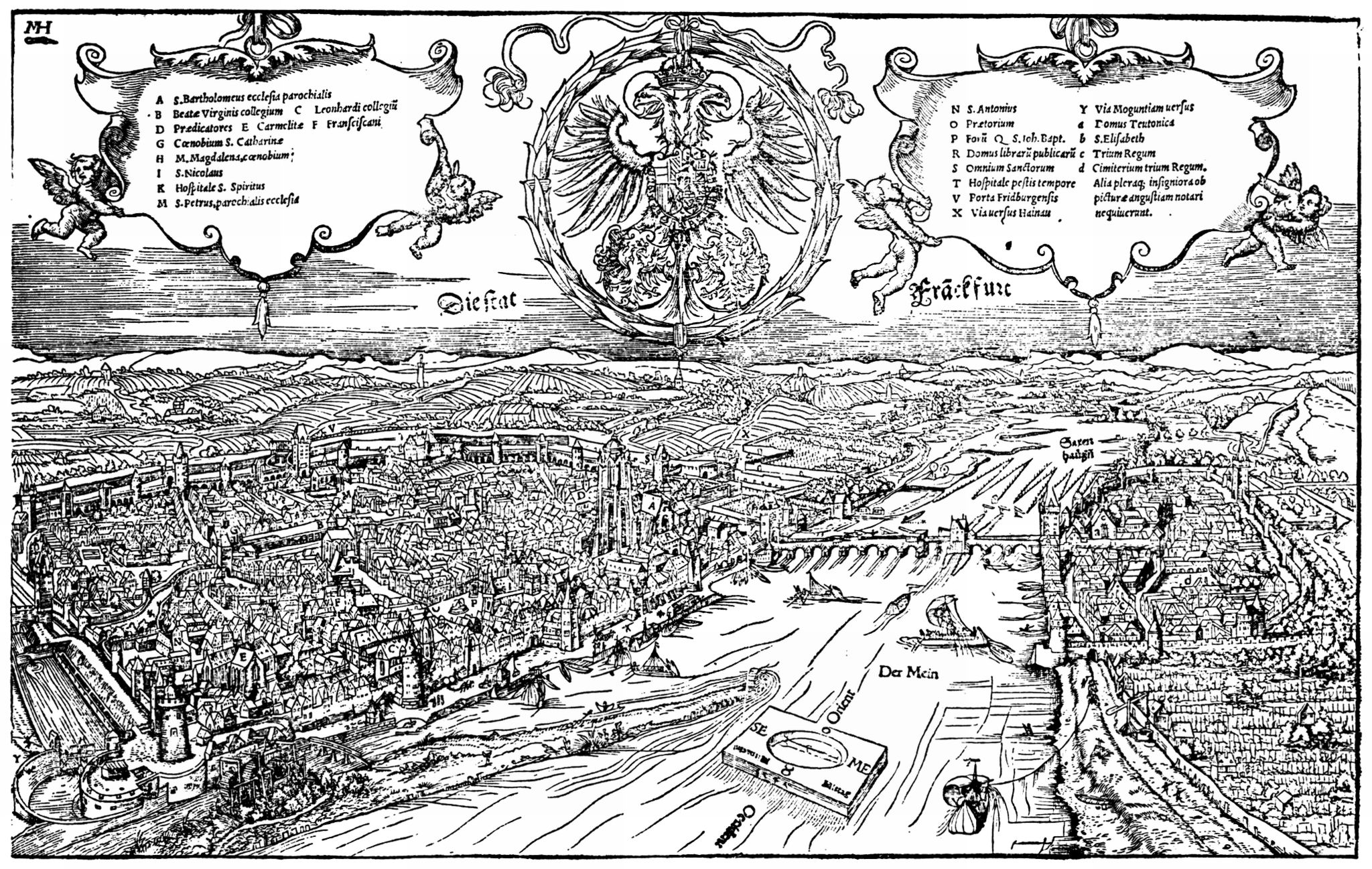 Holzschnitt 25 x 39,7 cm; Vogelschau von Westen auf Frankfurt am Main und Sachsenhausen ca. 1549